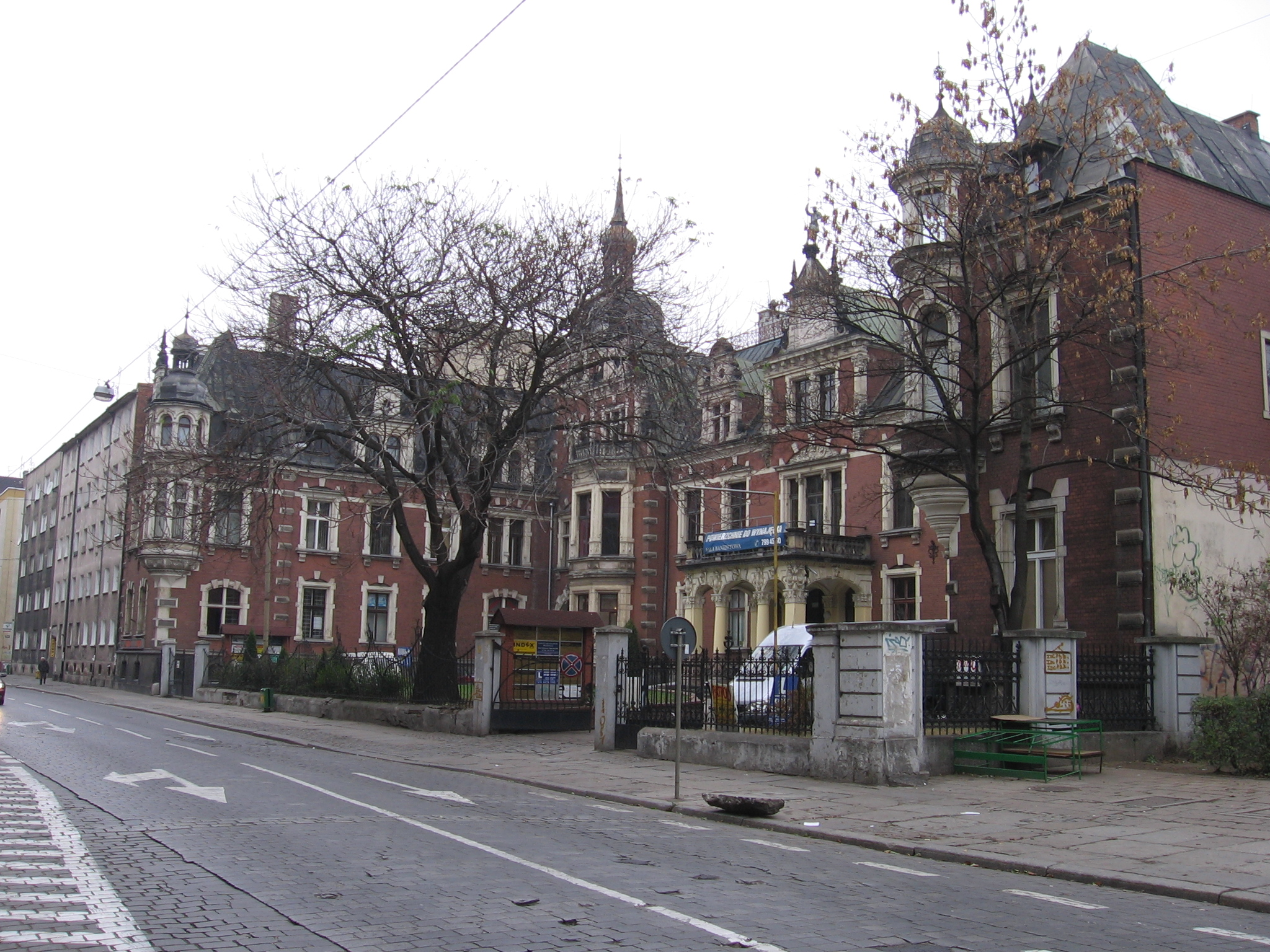 "Pałacyk" we Wrocławiu na ulicy Kościuszki, dawny pałac Schaffgotschów powstały w 1890 w wyniku przebudowy willi G. van Hessa wg projektu Karla Heidenreicha